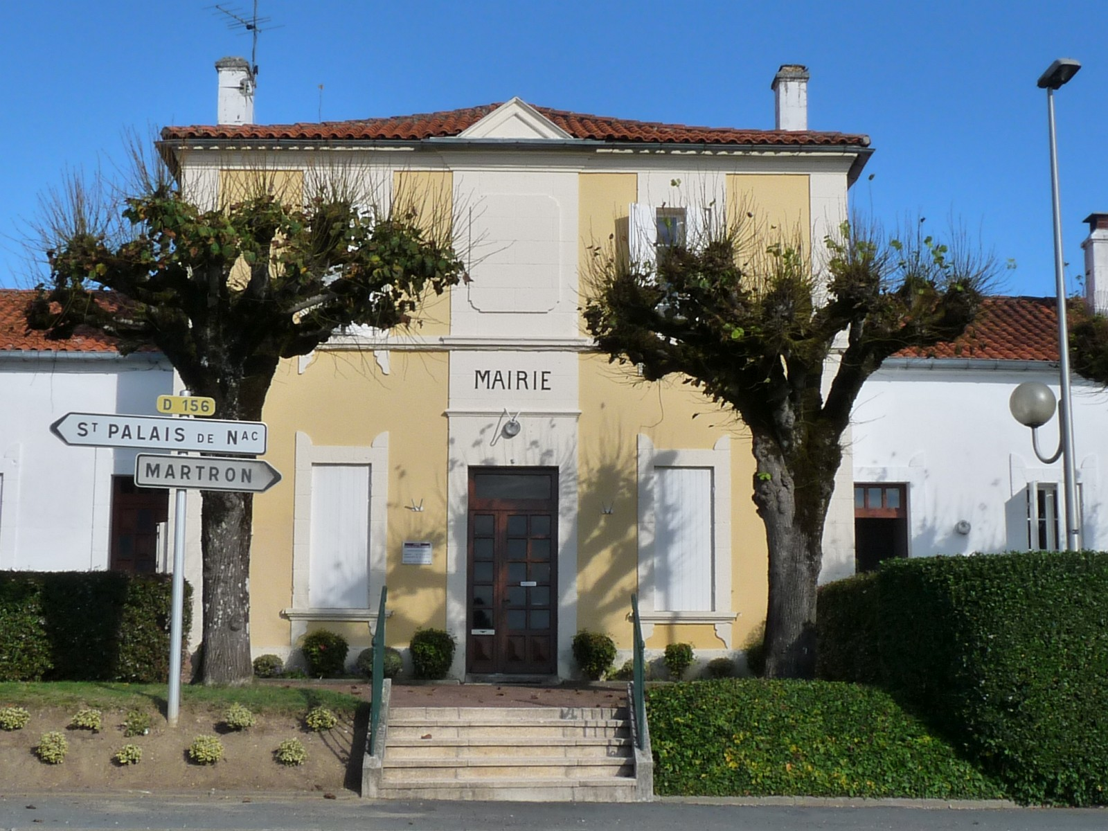 Mairie de Saint-Palais-de-Négrignac, Charente-Maritime, France